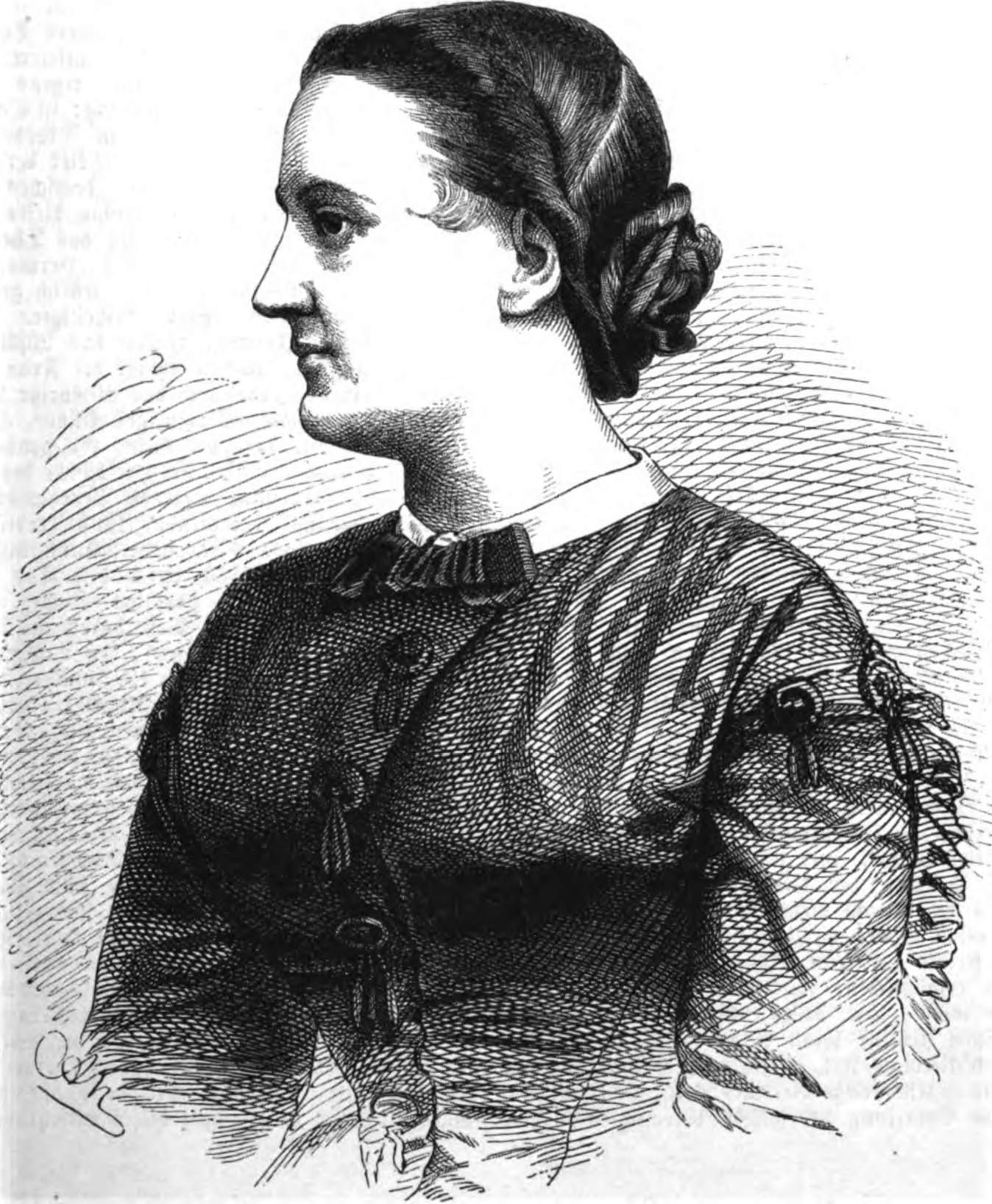 Carlotta Patti, italienische Sängerin im 19. Jh.